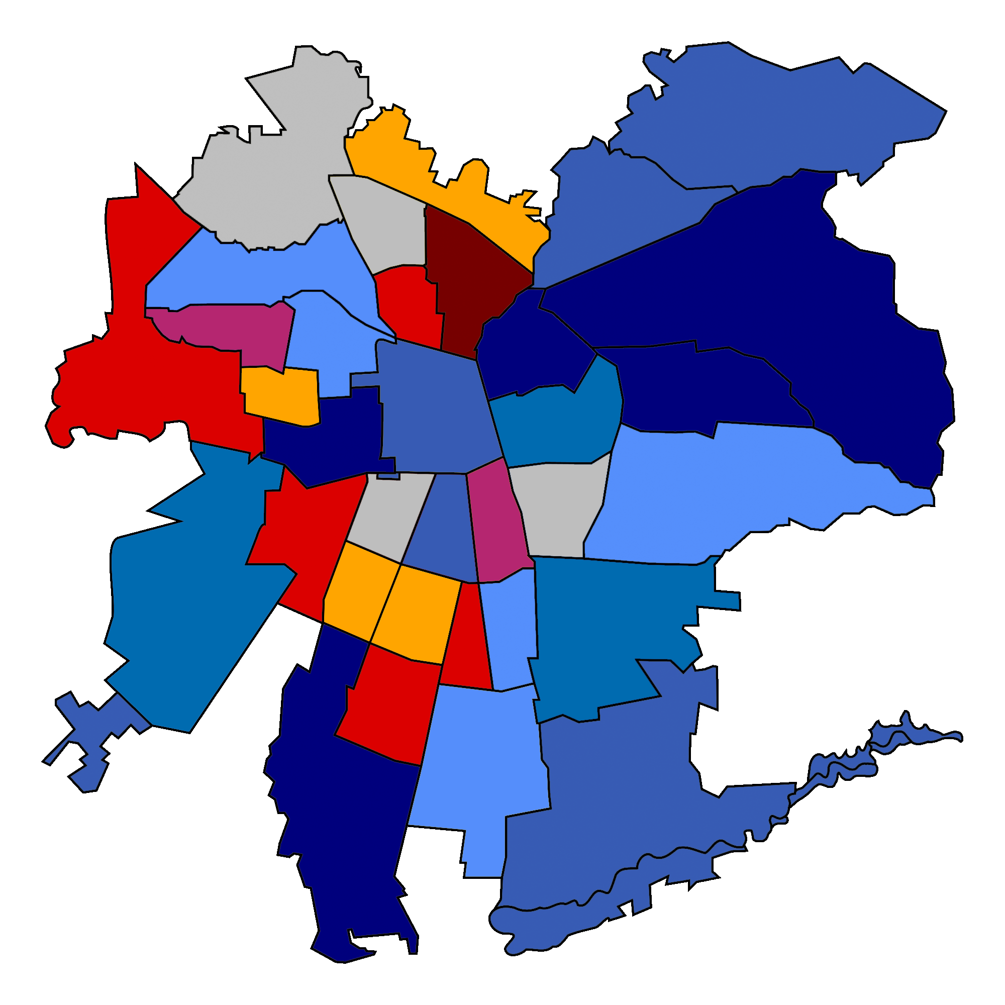 Resultado de las elecciones de alcaldes de 2012 en las comunas del Gran Santiago. PCCh PS PPD PDC Independientes pro-Nueva Mayoría Independientes Independientes pro-Chile Vamos RN UDI